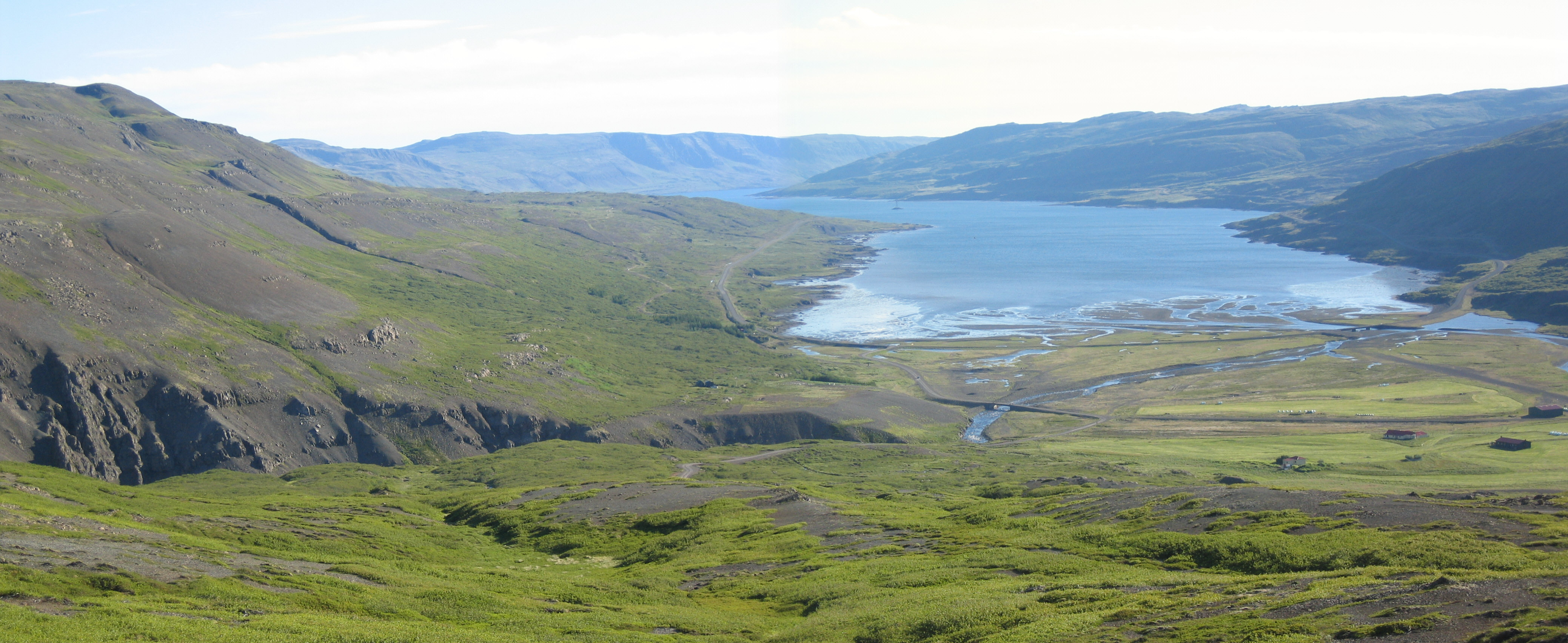 Þorskafjörður, séð frá Þorskafjarðarheiði Vestfirðir, Iceland photo by Salvör Gissurardóttir Julý 2006